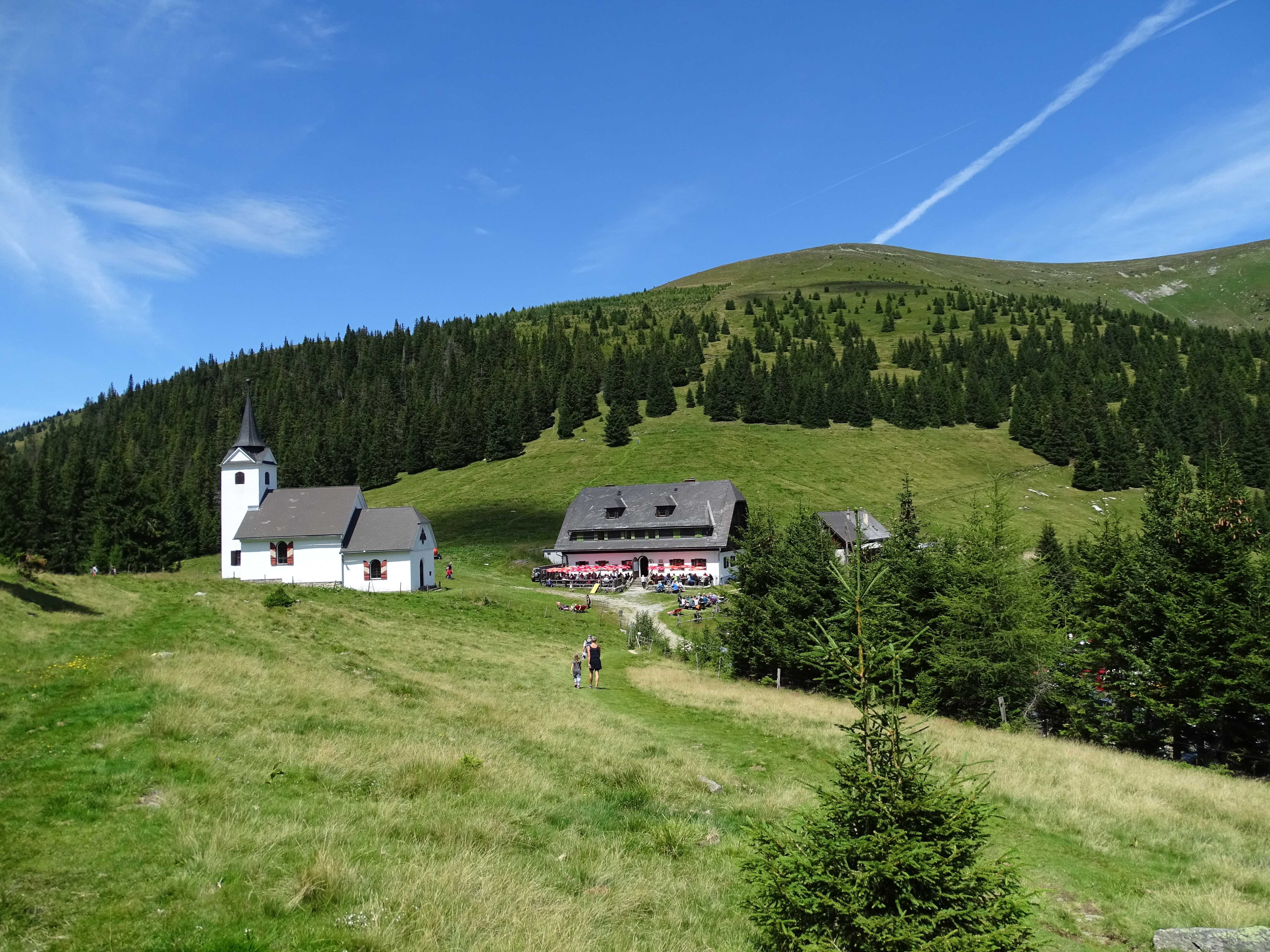 Blick von Süden auf den Gleinalmsattel mit dem Schutzhaus und der Kirche Maria Schnee am Oswalditag (5. August)